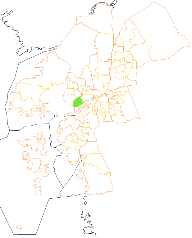 Karta som visar primärområdes belägenhet i Göteborg